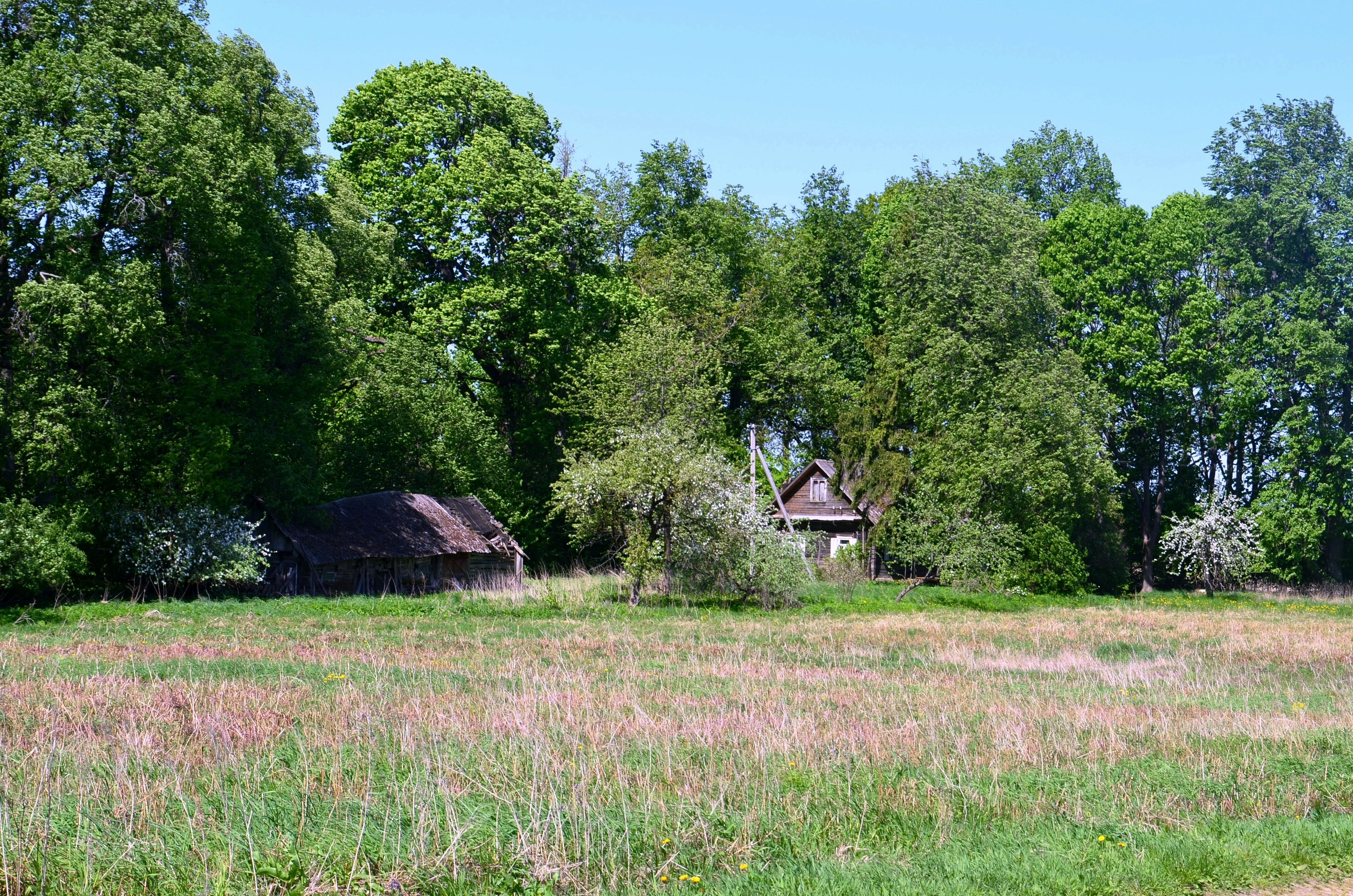 Pakalniai, Kavarsko sen., Anykščių raj.